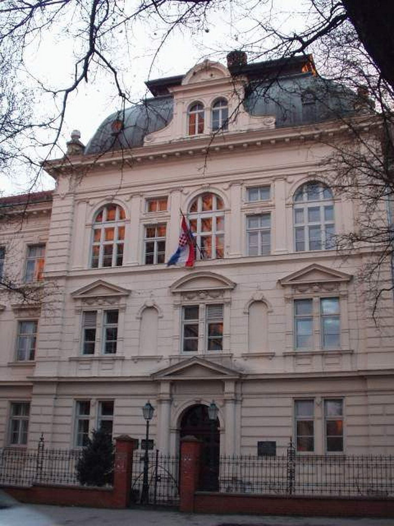 Bjelovar - Gymnasium